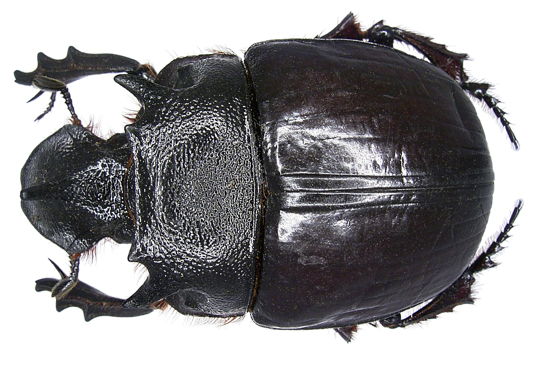 Familie: Scarabaeidae Grösse: 29 mm Verbreitung: Indien, Indochina, Malaysia Fundort: Thailand, Chiang-Mai leg. Lehmann, 1987; det. U.Schmidt Foto: U.Schmidt, 2006